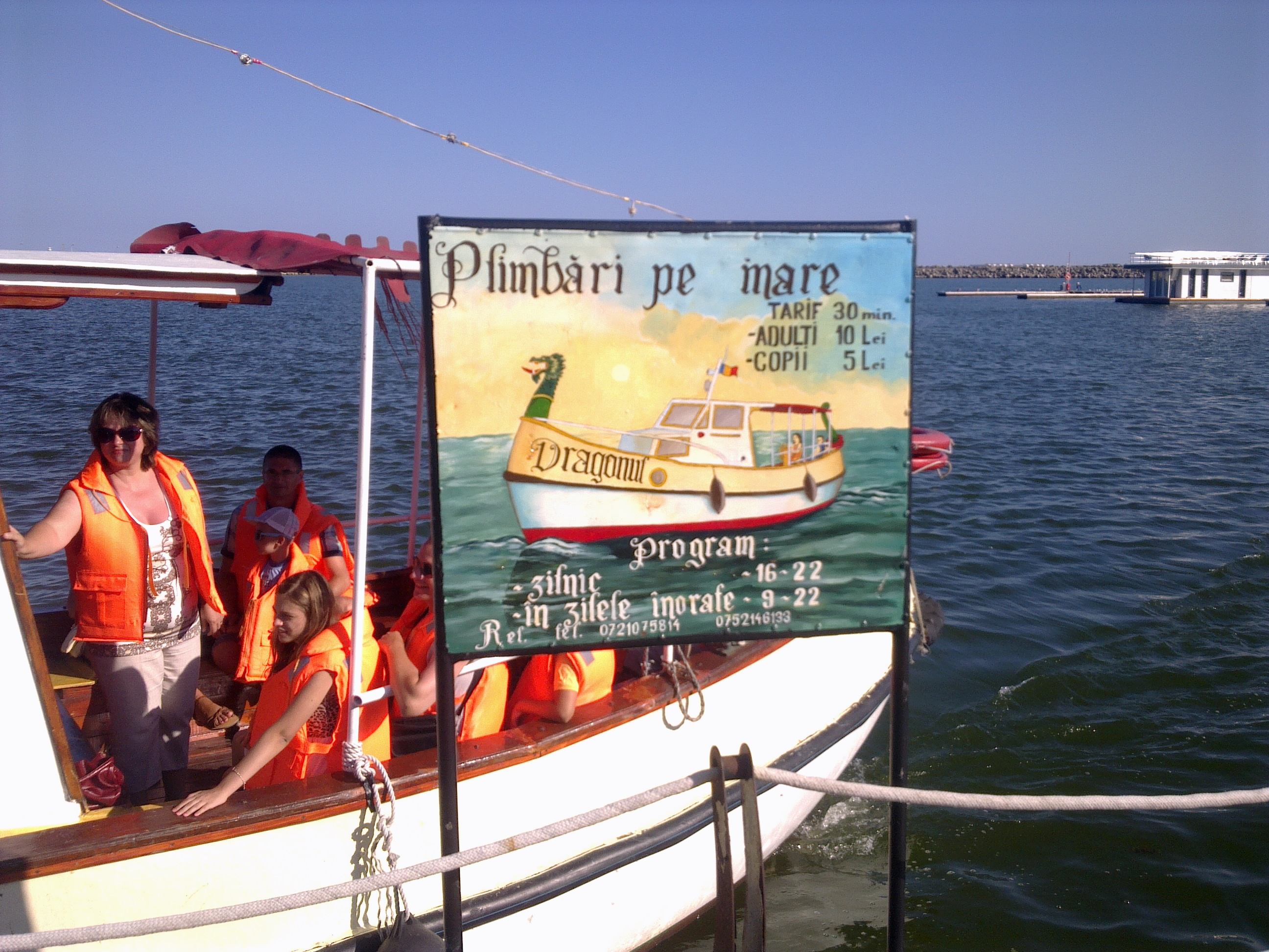 Plimbări pe mare cu barca cu motor. Plecare din Portul Mangalia.